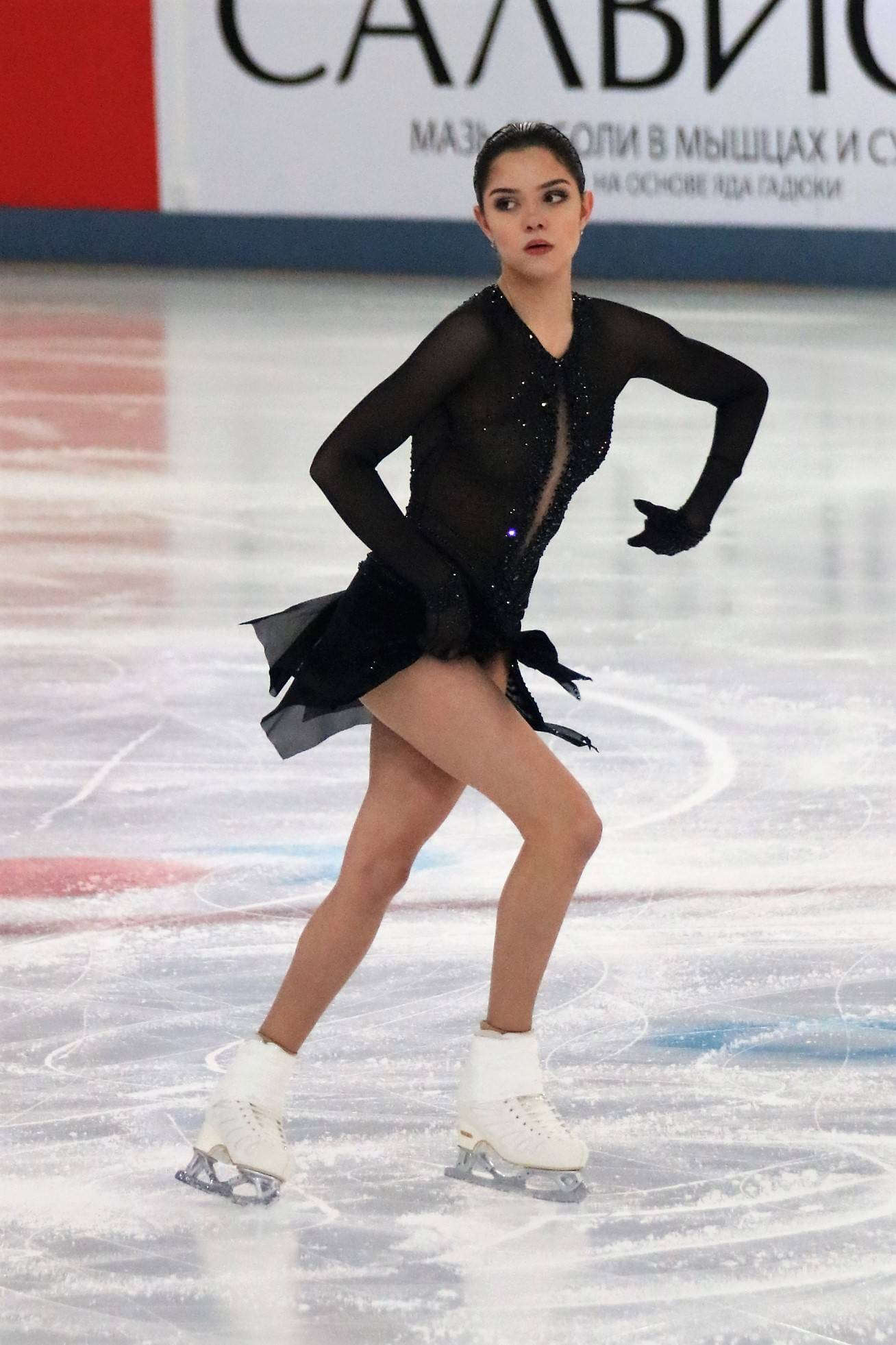 Евгения Медведева на чемпионате России по фигурному катанию на коньках 2019